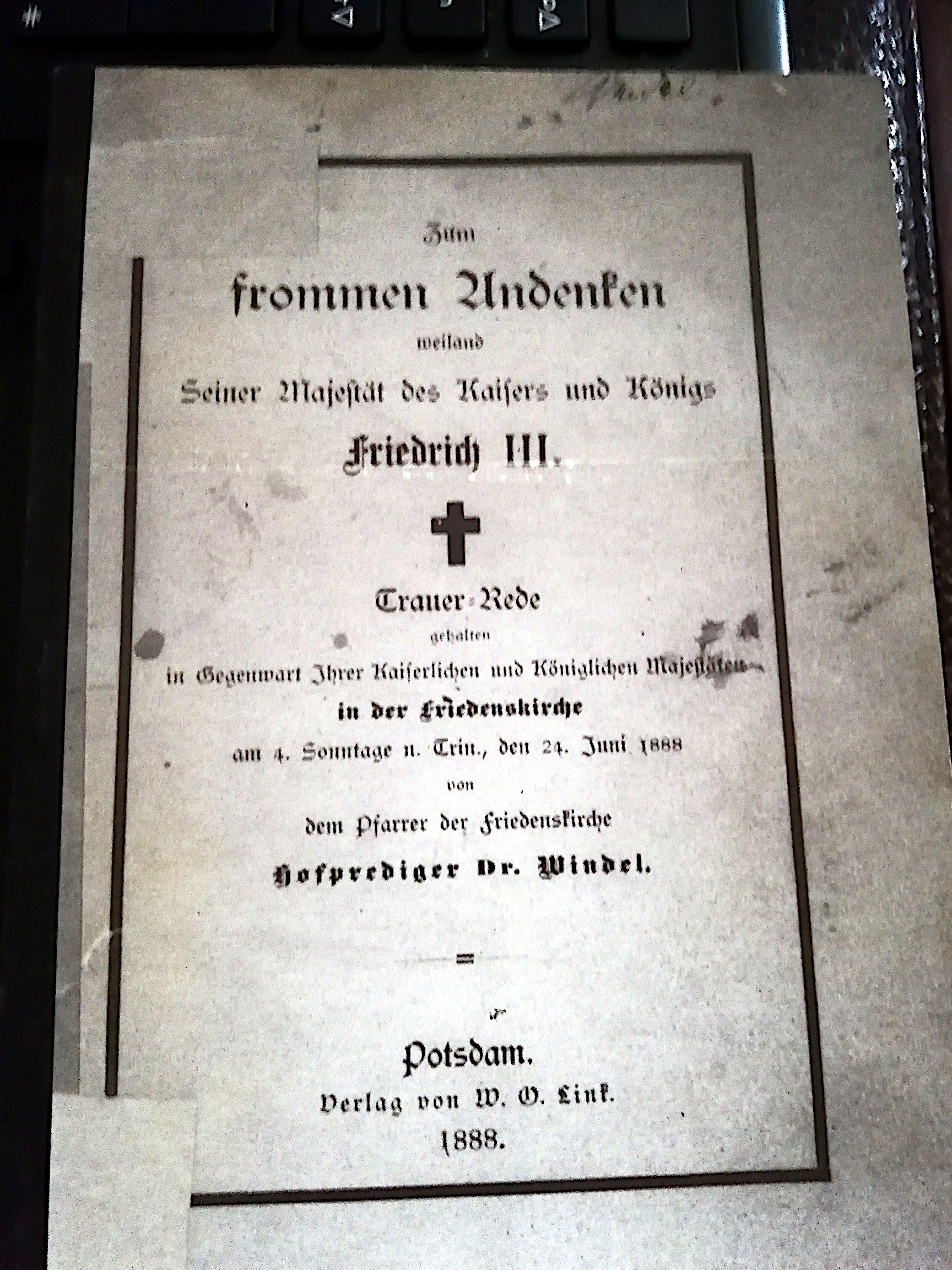 Titelblatt der Trauerrede des Hofpredigers Dr. Winkel zum Tode Kaiser Friedrichs III., 24. Juni 1888, Potsdam